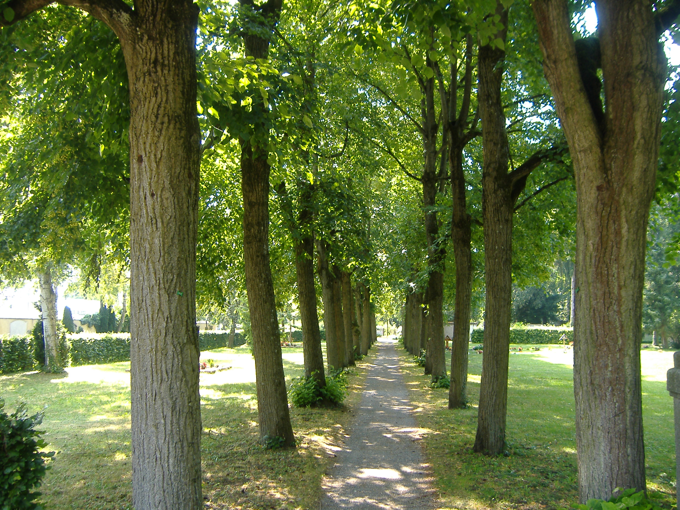 Lindenallee im Westfriedhof Augsburg